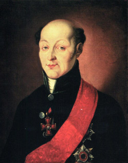 Портрет Сперанского руки иркутского художника М. Васильева